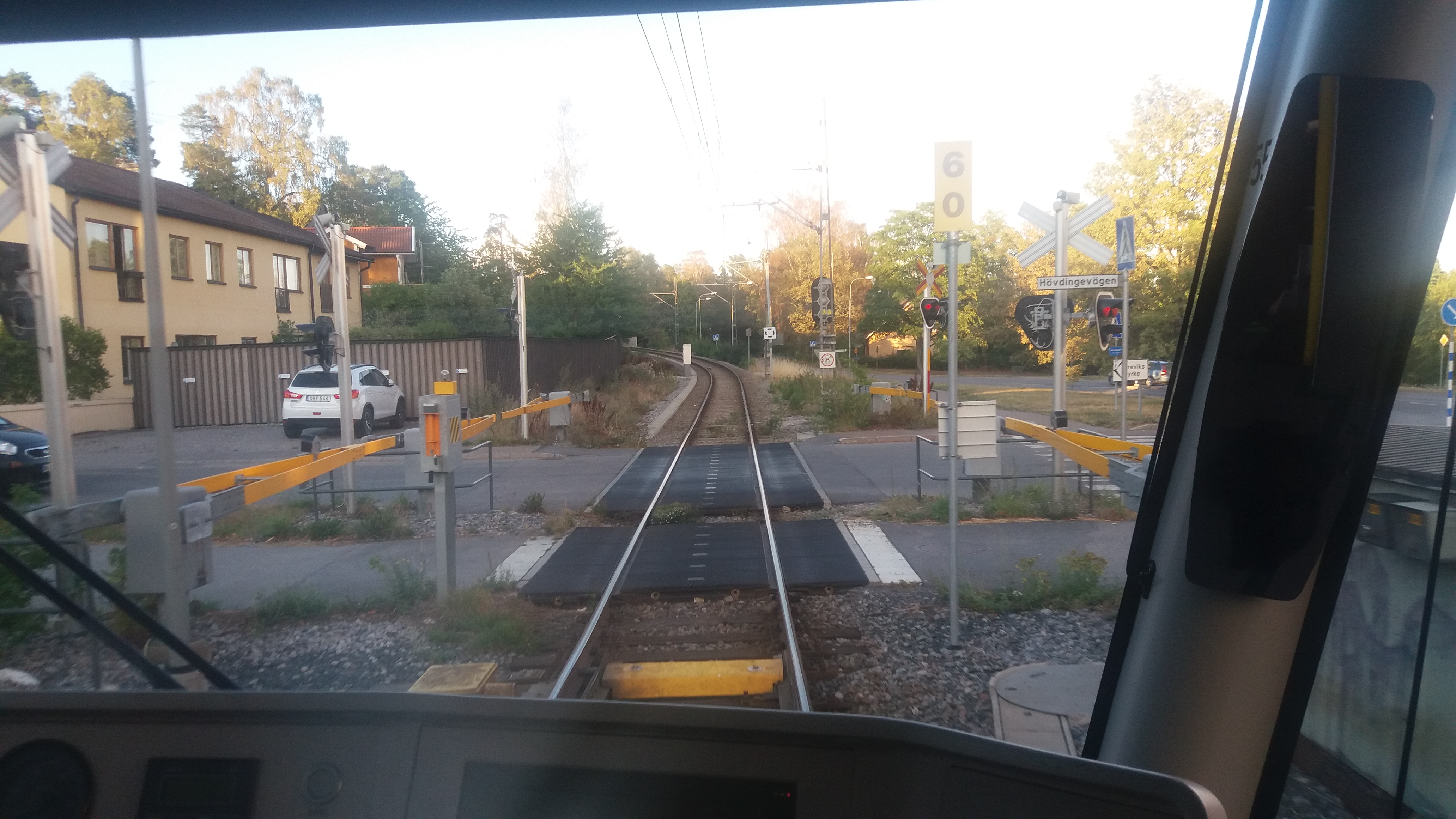 Lidingöbanans Järnvägskorsning vid Brevik